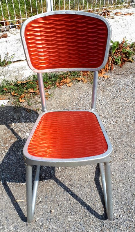 Chaise métallique en aluminium réalisée à la SNCASE Cannes en 1945